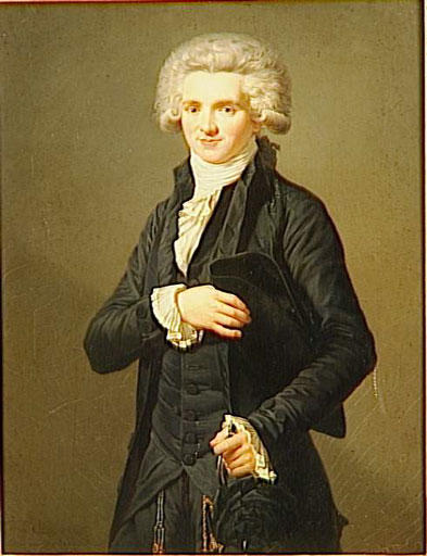 Portrait de Maximilien de Robespierre en habit de député du Tiers Etat